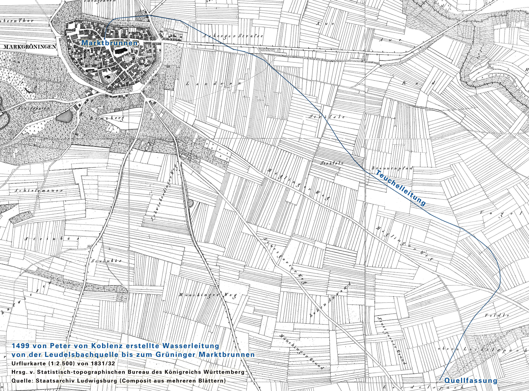 Wasserleitung von der Oberen Leudelsbachquelle zum Grüninger Marktbrunnen, 1499 von Peter von Koblenz erstellt.